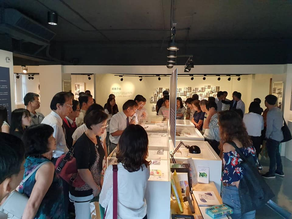 中文（台灣）: 「彗星畫過的那一頁：江凌青特展」展場。 活動當日於現場台中作家典藏館拍攝。